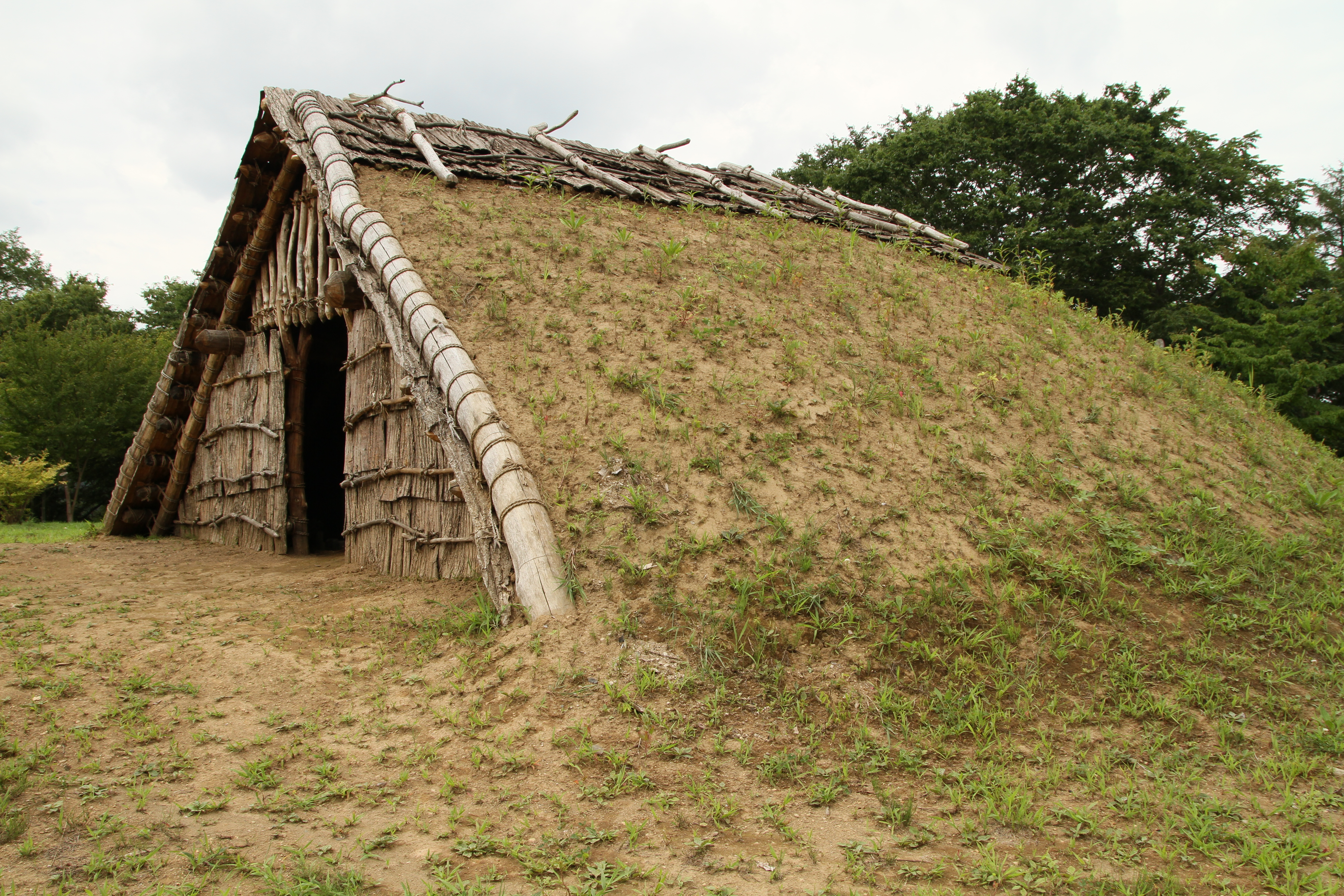 土屋根として復元された御所野遺跡の竪穴式住居